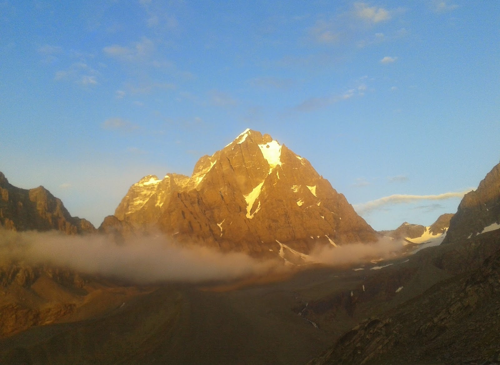 यह मुख्य कैलाश का चित्र है !